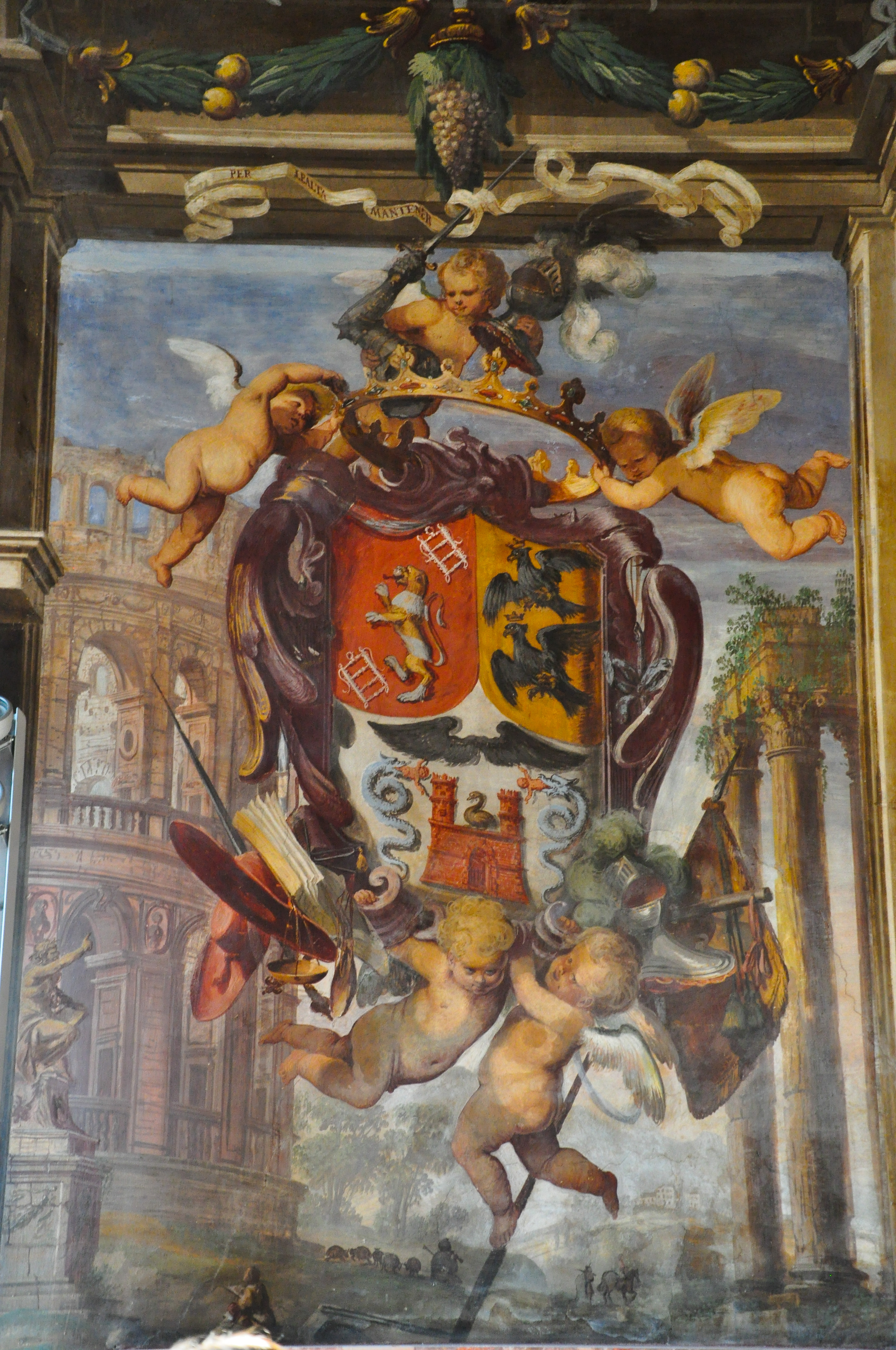 primo piano, stemma della famiglia